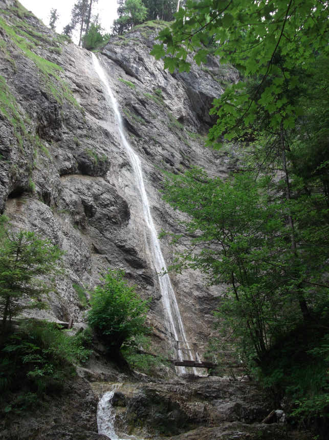 Wasserfall Nixenfall am Eibenberg (789m).